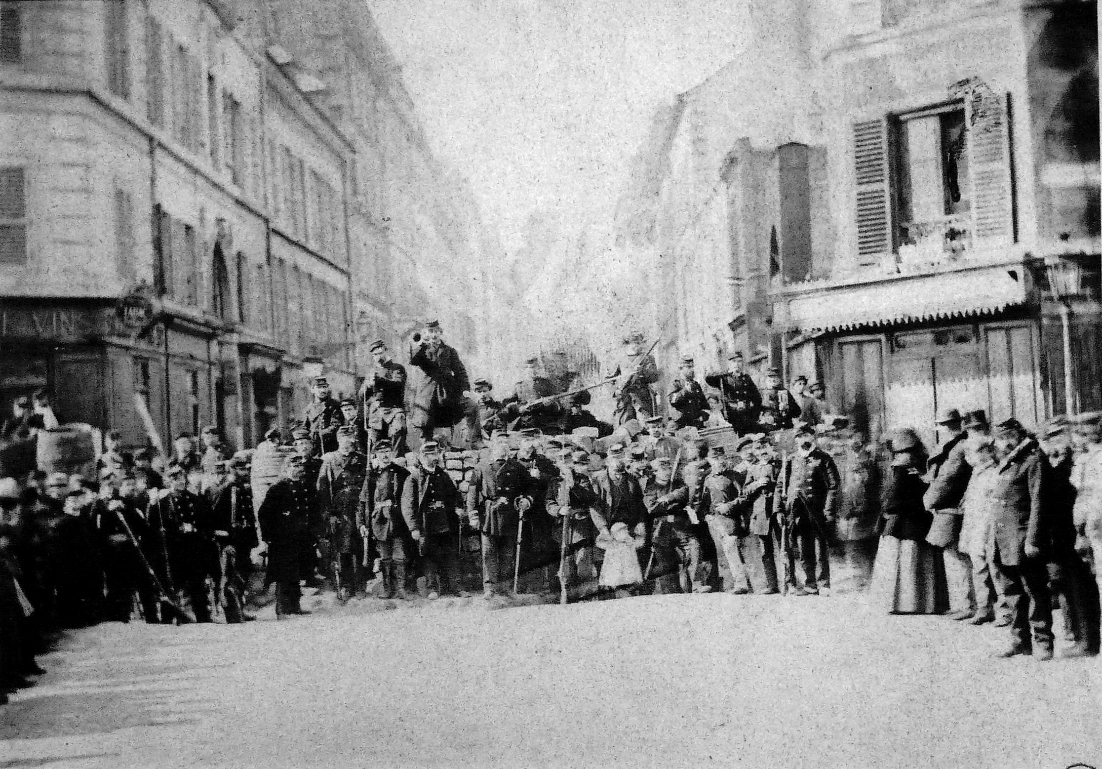 Exposition La Commune de Paris à l'Hôtel de Ville de Paris (18 mars - 28 mai 2011) - Barricade rue Saint-Sébastien au carrefour avec le boulevard Richard-Lenoir - Bibliothèque historique de la Ville de Paris.